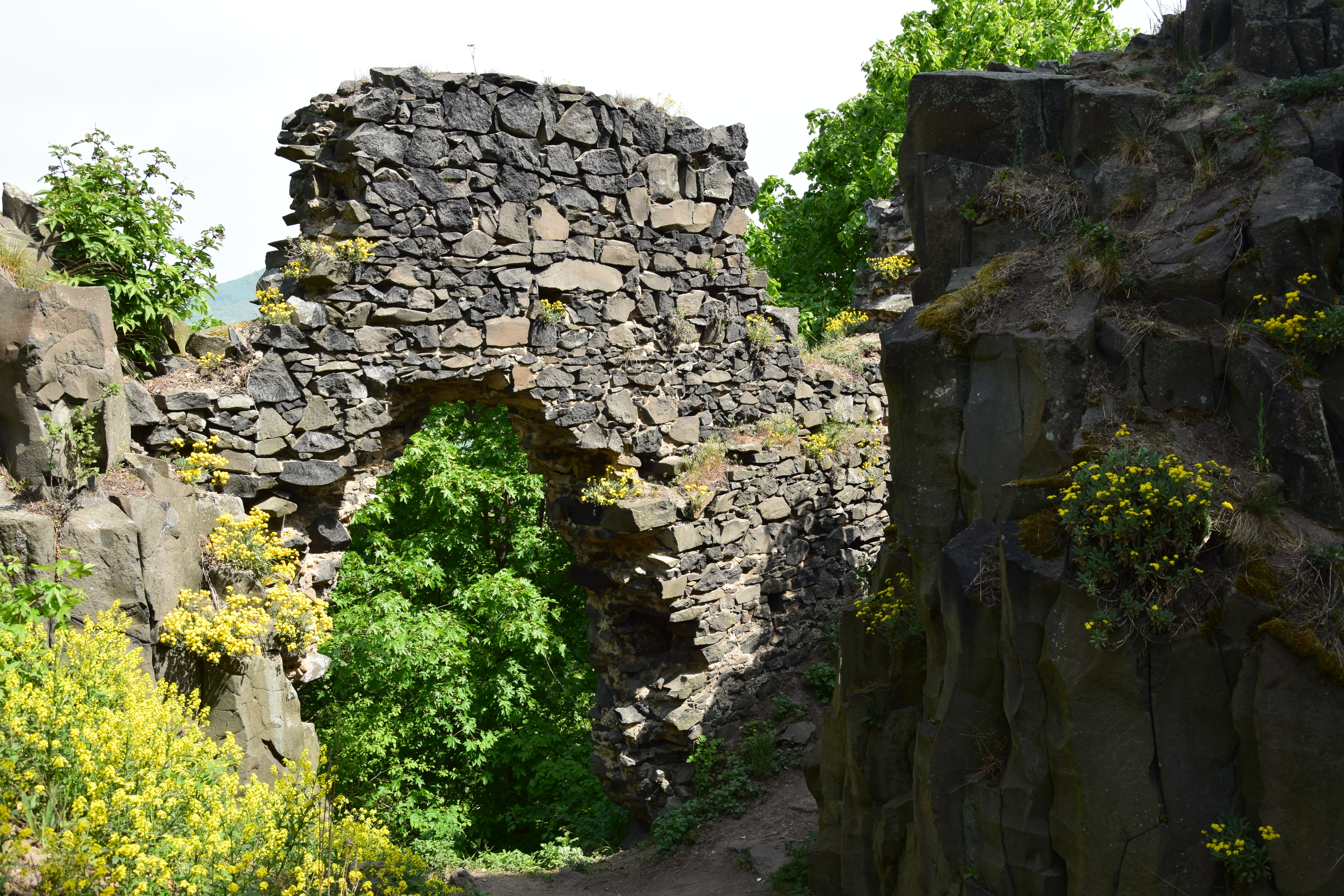 Ostrý – brána (pohled z nádvoří)